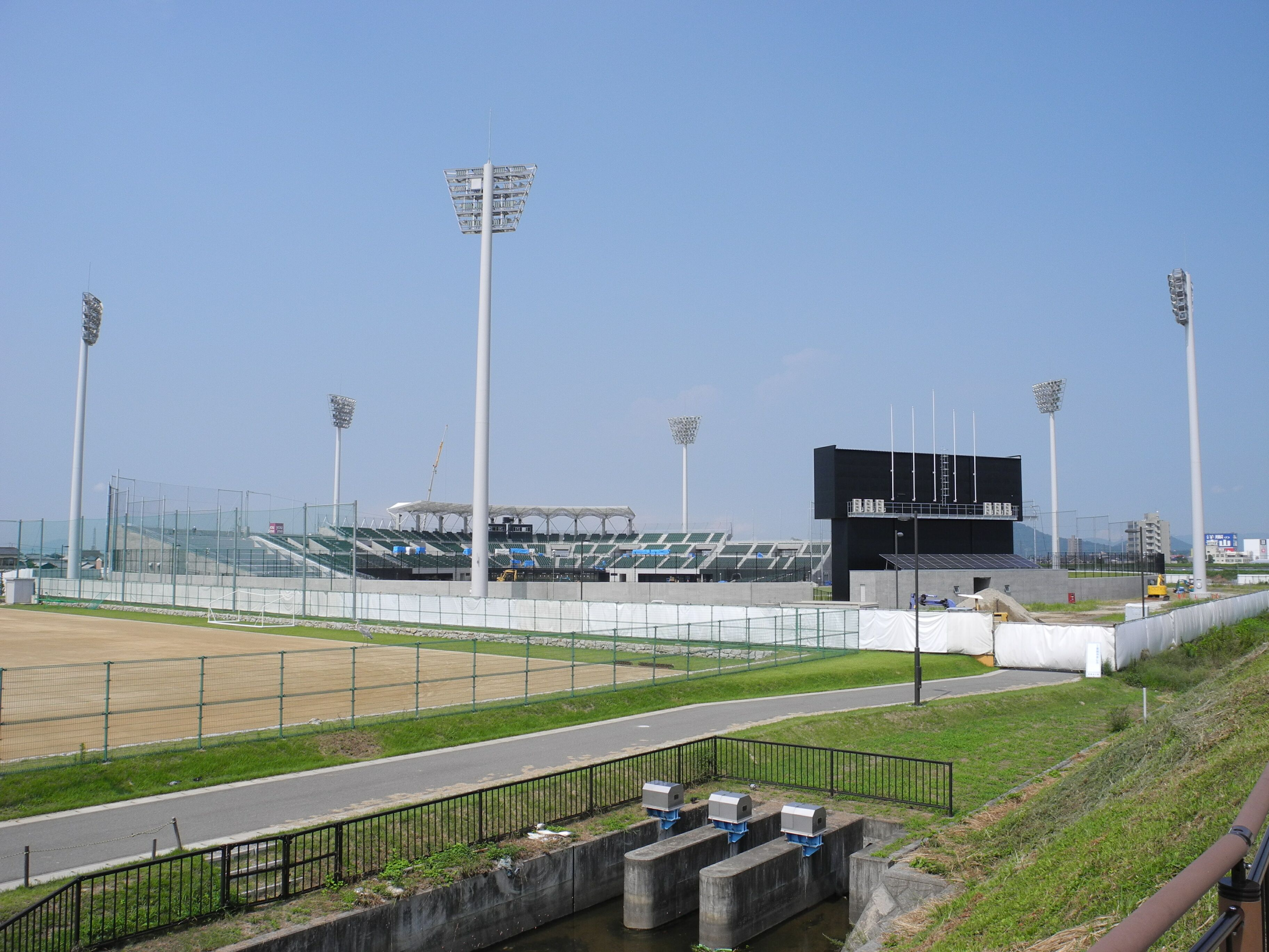 丸亀市民球場 - 日本国香川県丸亀市。